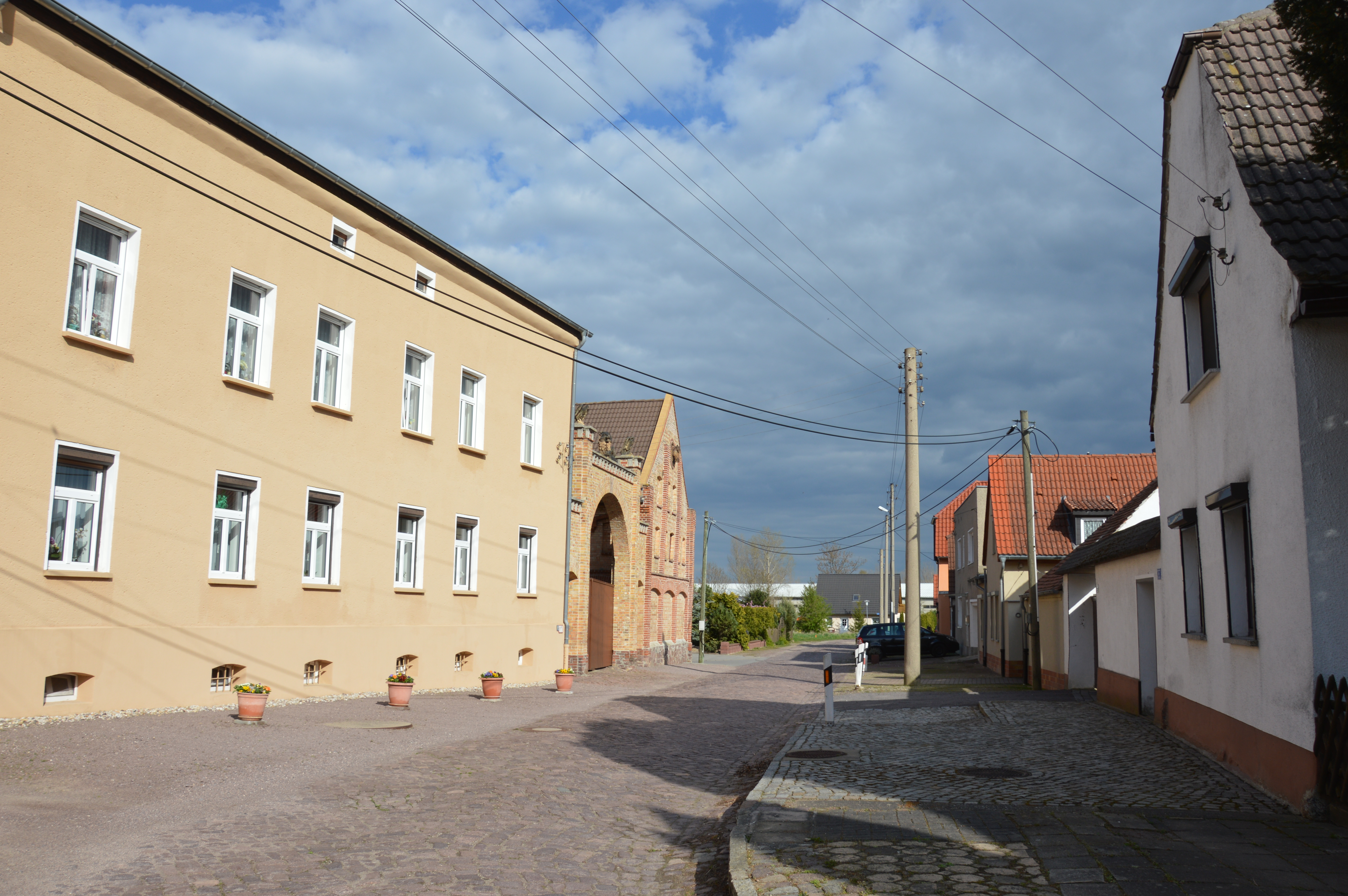 Straße in Harsdorf in Oppin